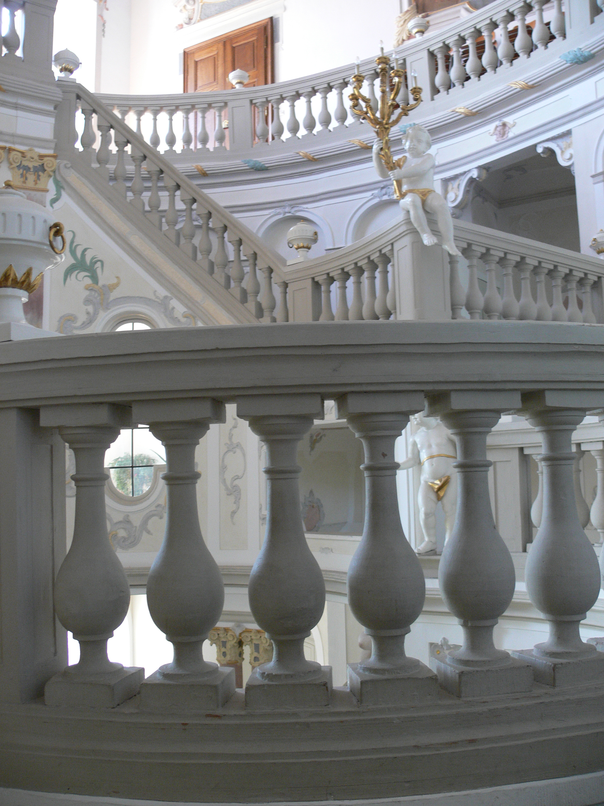 Schloss Wurzach, Bad Wurzach, Baden-Württemberg Treppenhaus, 1723–1728